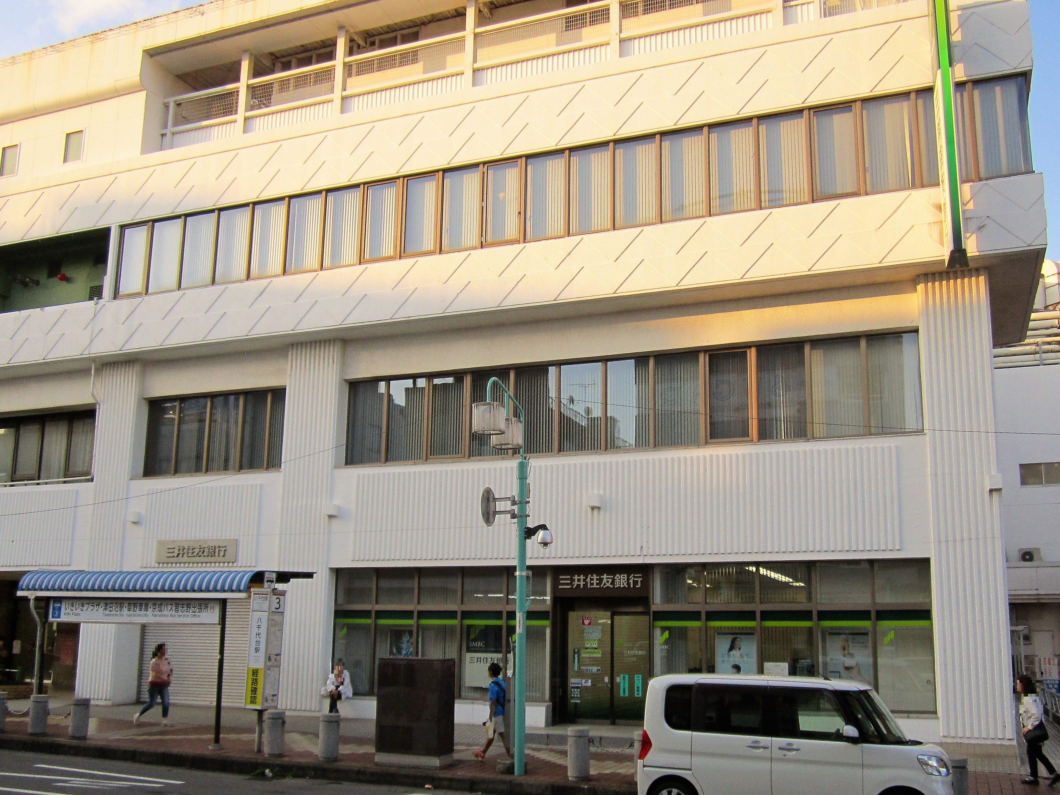 三井住友銀行八千代支店（八千代市八千代台東）